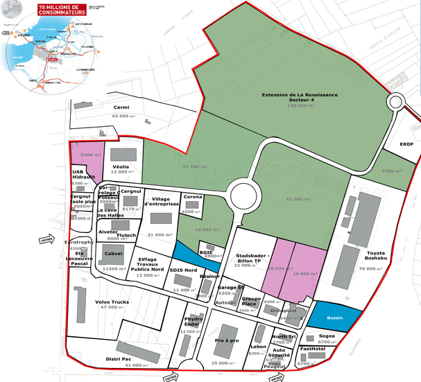 ZA-La-Renaissance - plan